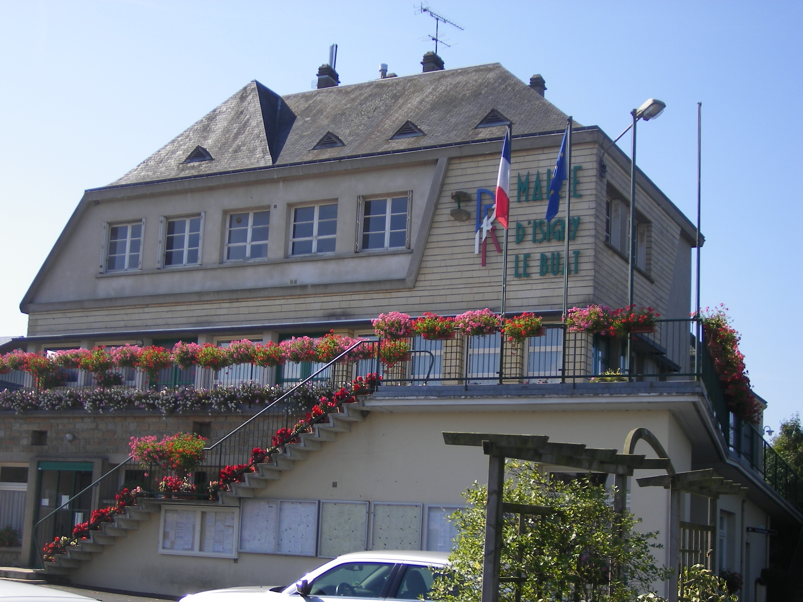 La mairie d'Isigny le Buat en août 2007.